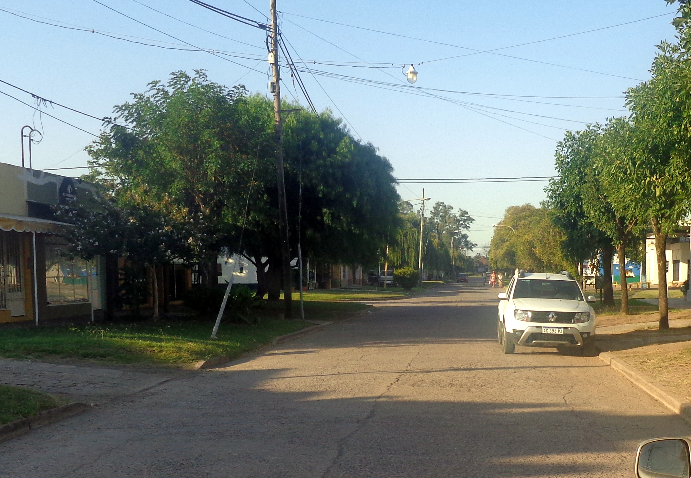 Calle Ayacucho entre San Martín y Maipu. Santa Lucía, San Pedro, Buenos Aires, Argentina.